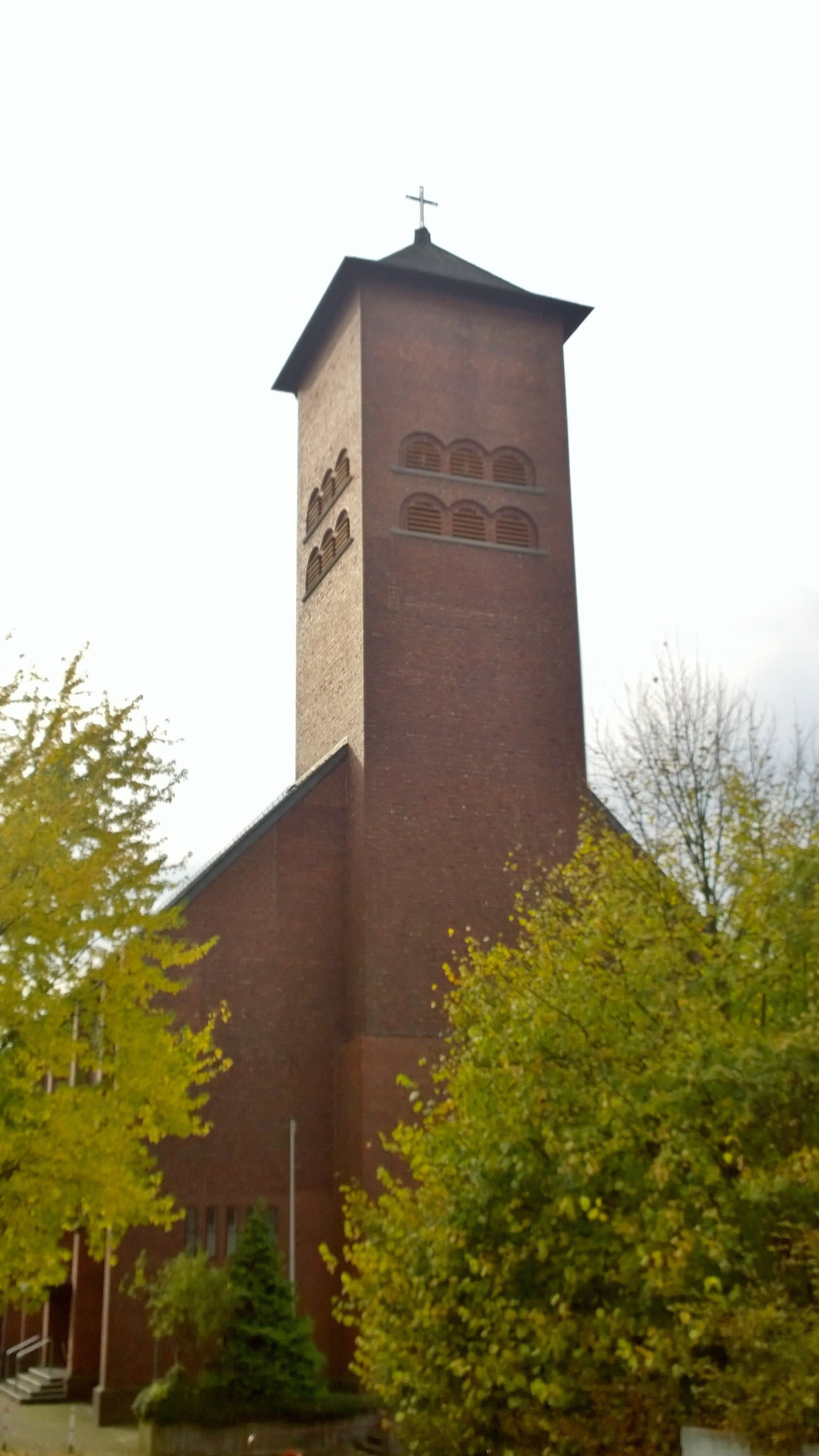 Fassade-St. Suitbertus Solingen